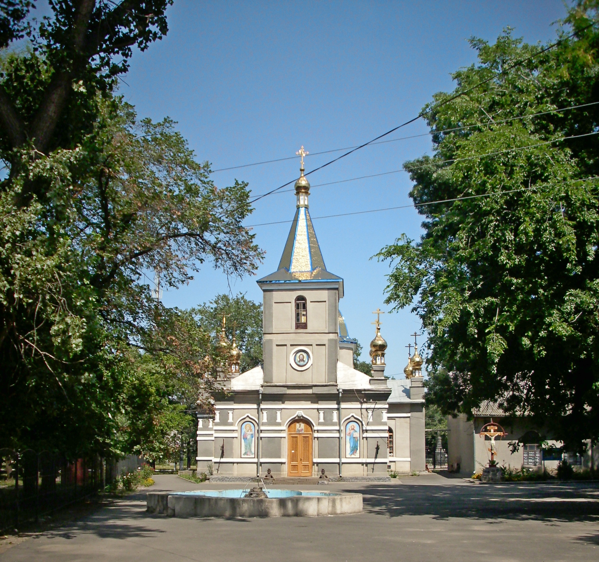 Церква Святого Миколая